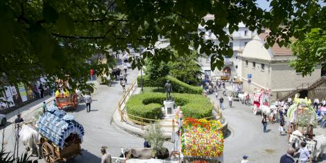 i carri